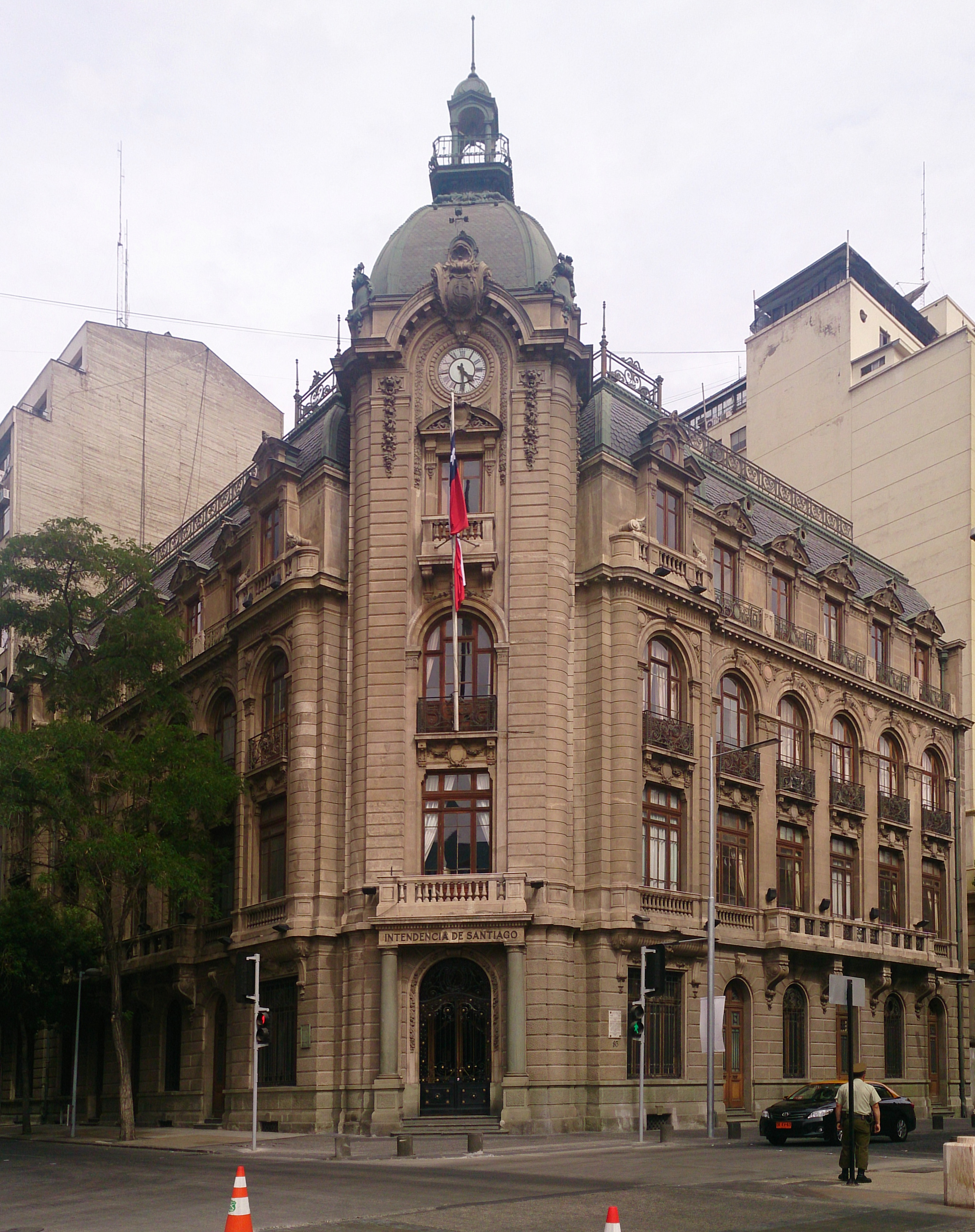 Fachada del edificio de la Intendencia Regional de Santiago, Chile.